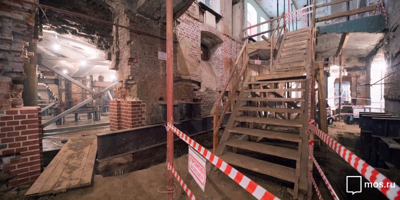 Дом Казакова будут готовить к реставрации)